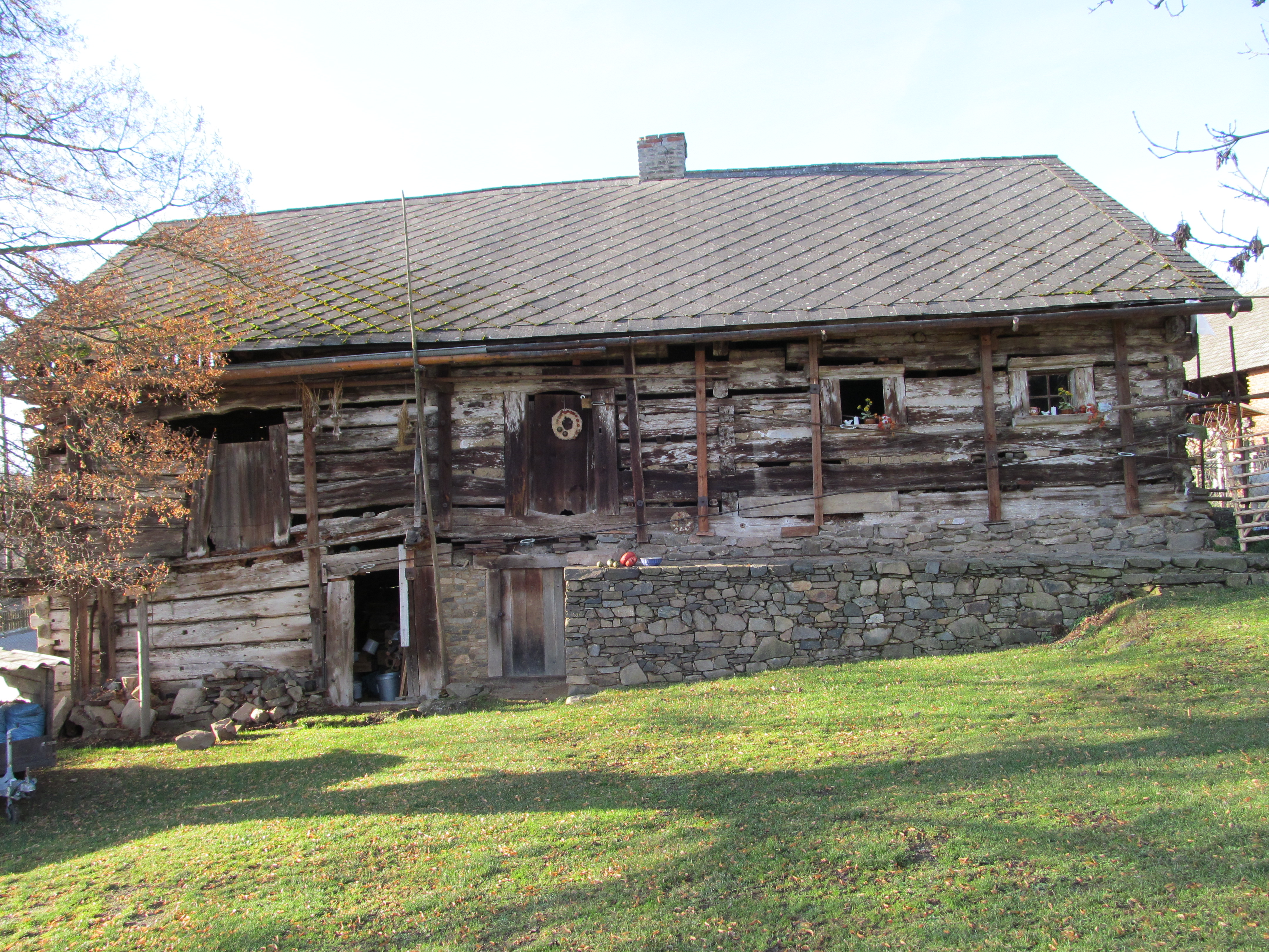 Stárkova chalupa, Přibyšice čp. 4.